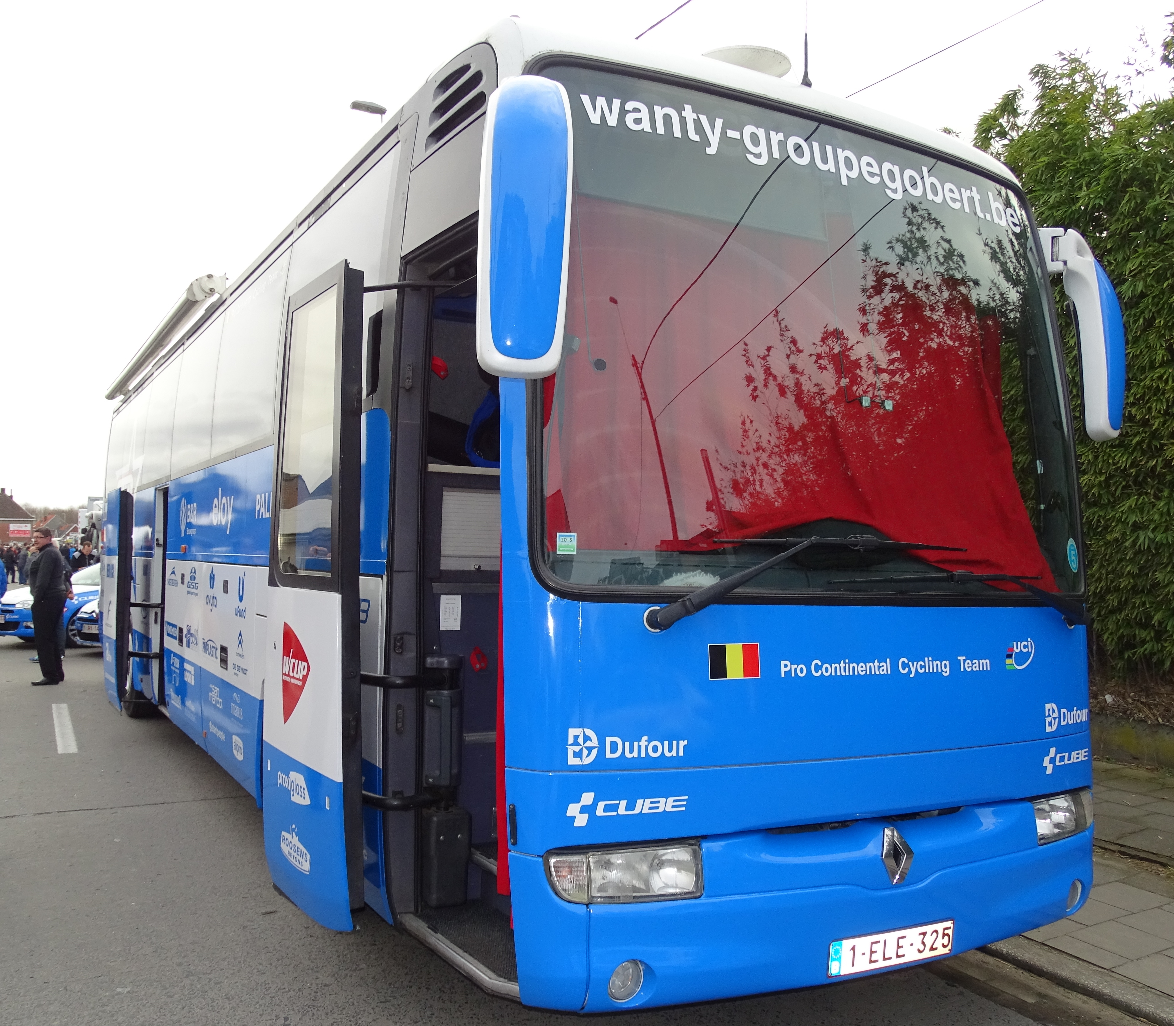 Reportage réalisé le vendredi 27 mars à l'occasion du départ et de l'arrivée du Grand Prix E3 2015 à Harelbeke, Belgique.